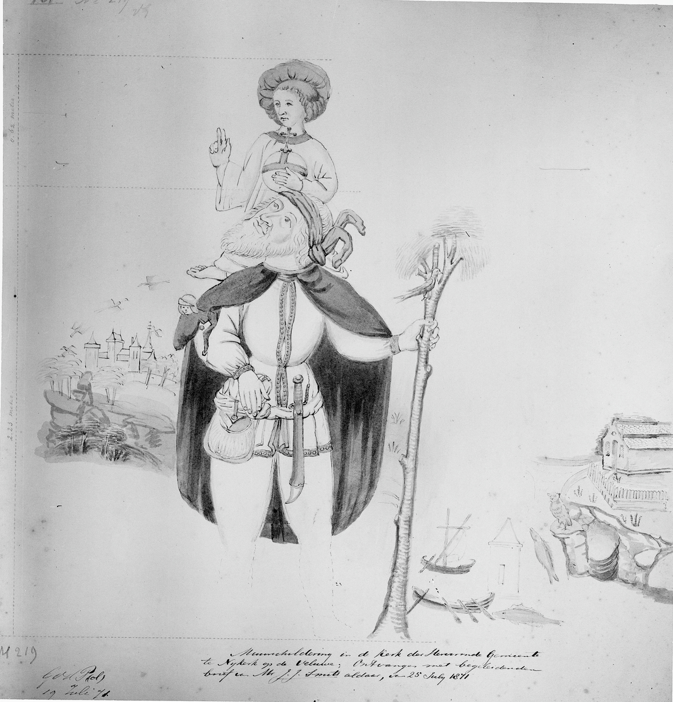 Nederlands Hervormde Kerk en Toren: muurschildering naar tekening